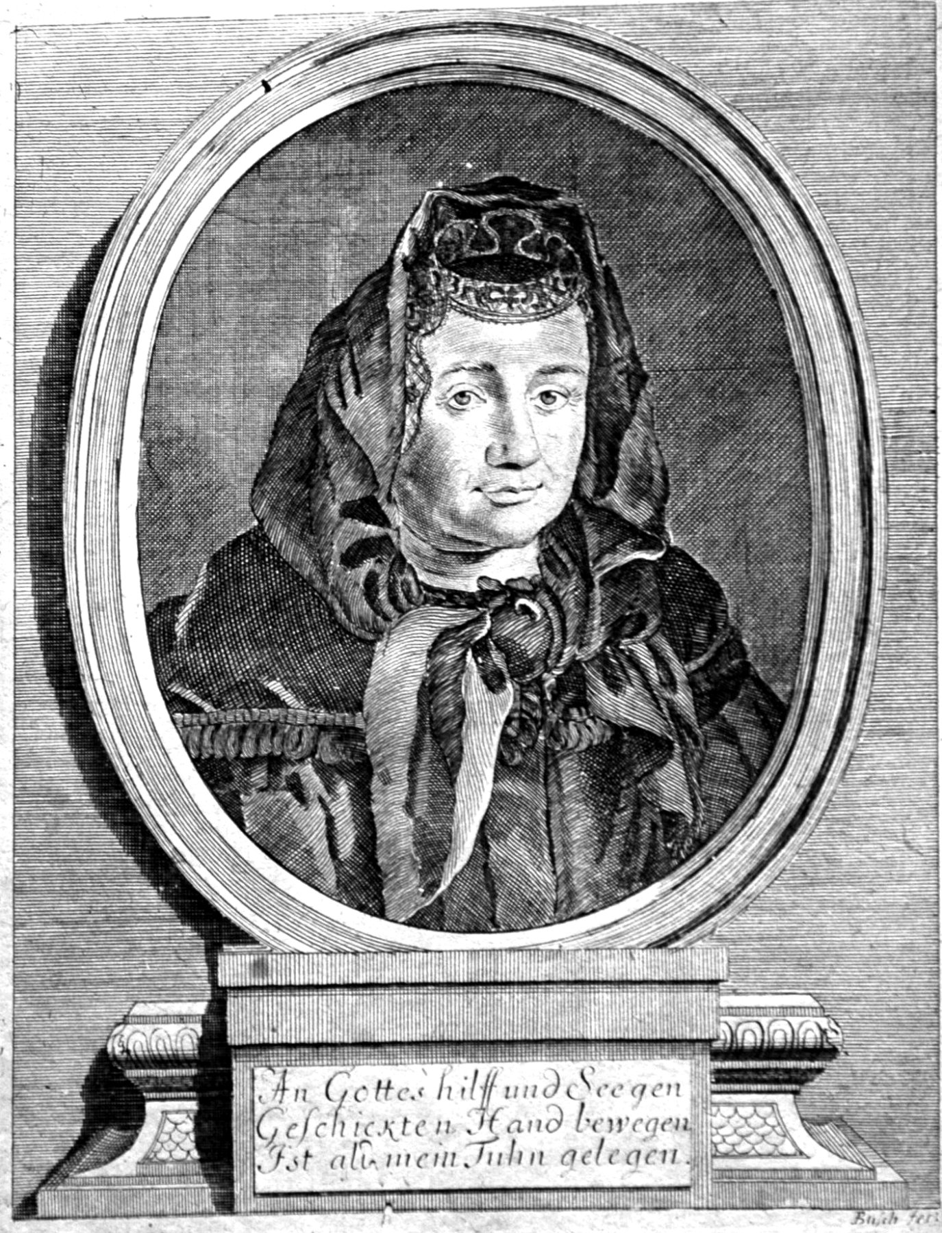 Justina Siegmundin miedzioryt z ok. 1690 r.